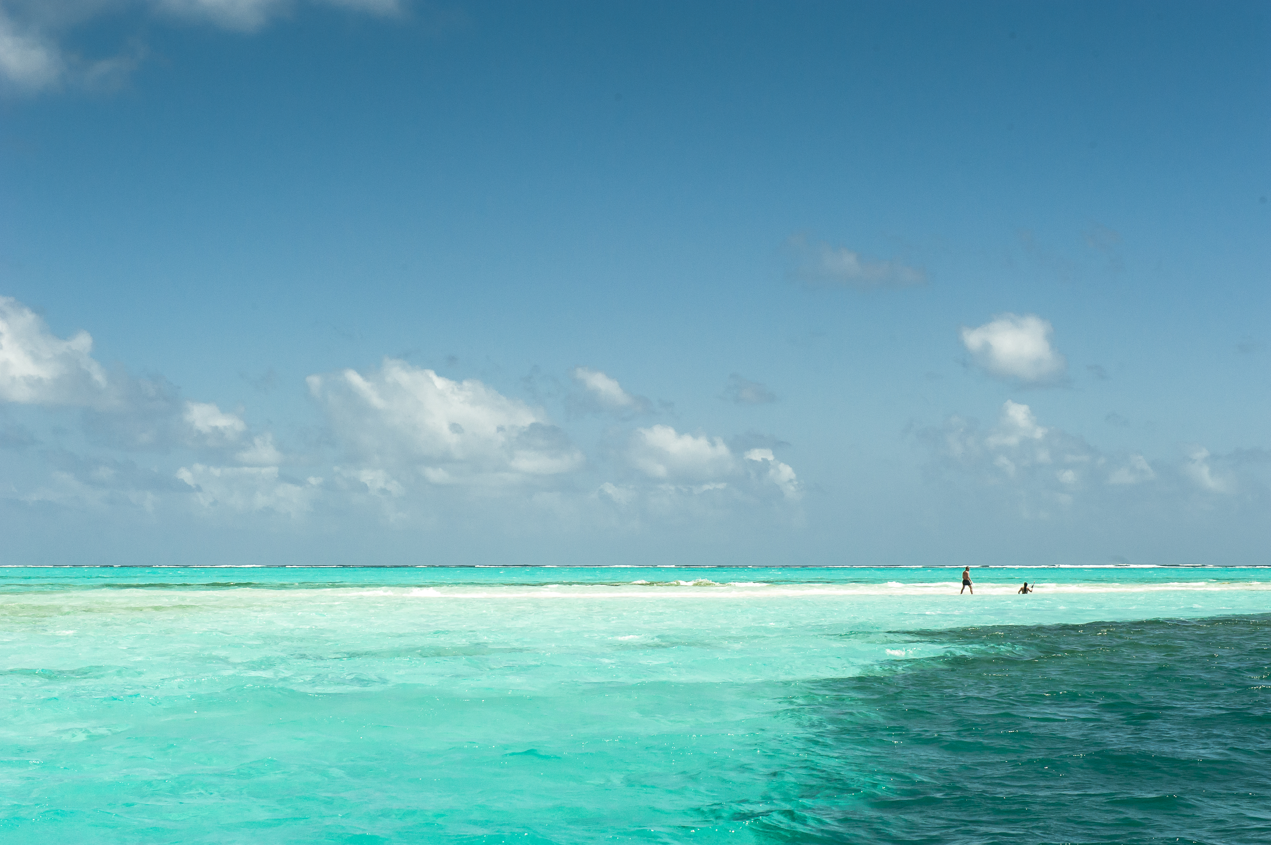 Panorámica del Acuario de San Andrés.